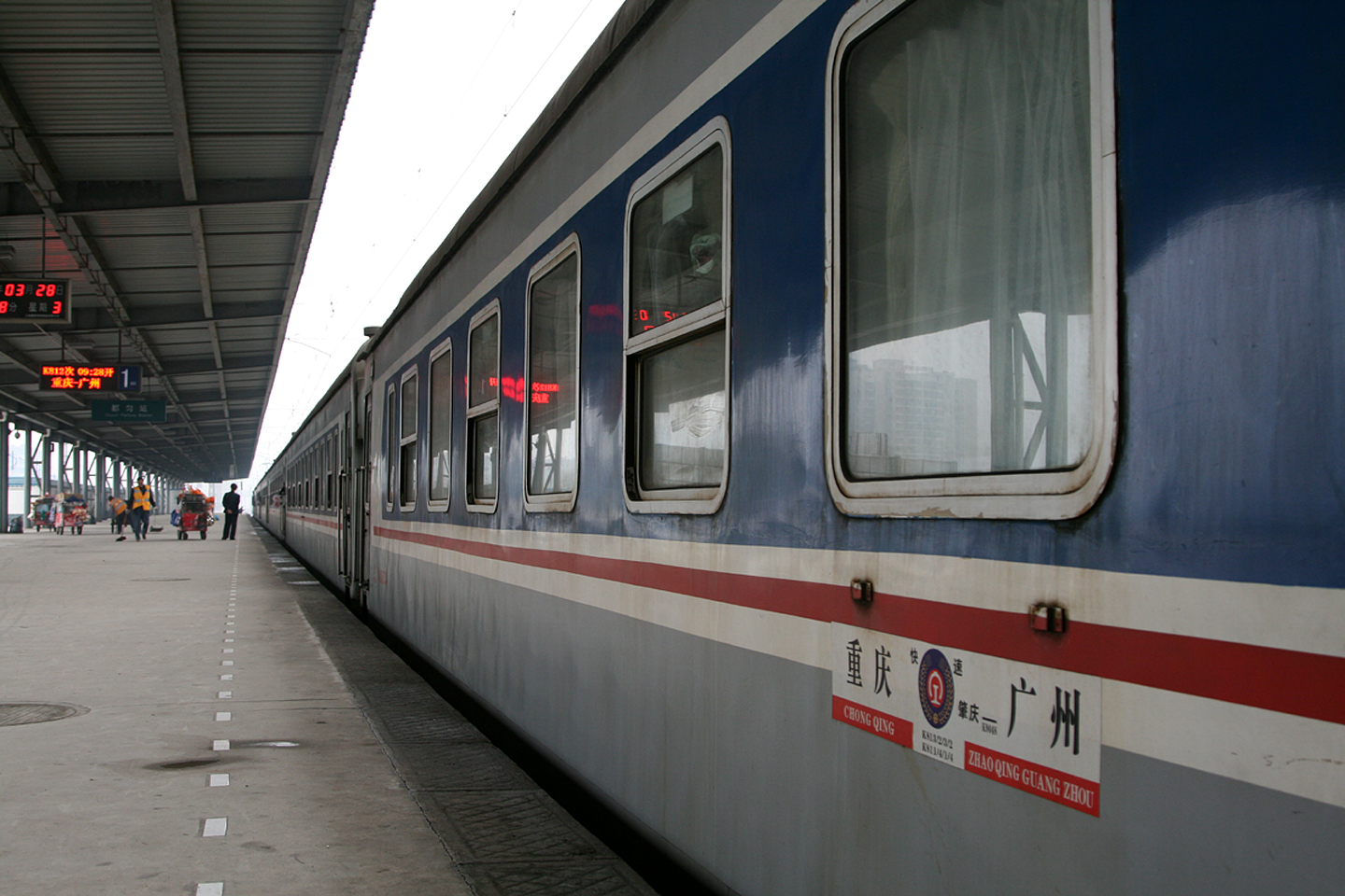 停靠于都匀站的K812次列车。